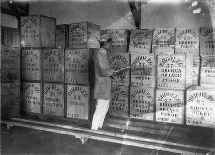 Foto. Kotak-kotak teh tersusun rapi siap dikirim. Pabrik teh Tjigolek, Jawa.